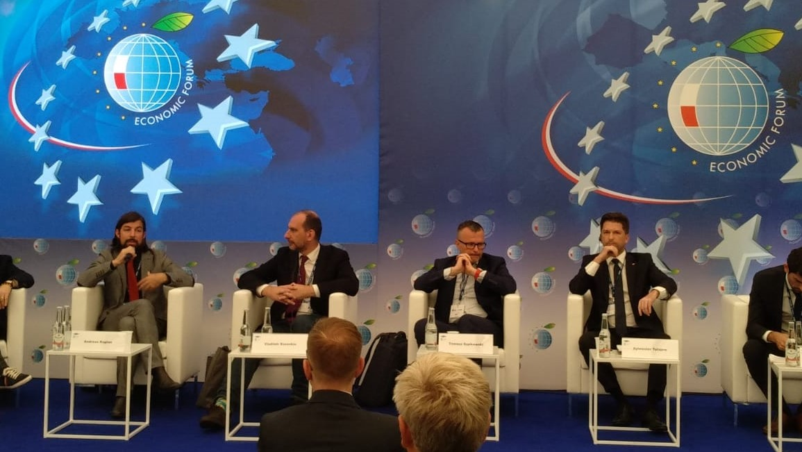 Economic Forum in Krynica-Zdrój 2019 - Sylwester Tulajew, Andreas Kaplan, Tomasz Szpikowski